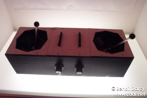 Photos de l'exposition "Pink Floyd Interstellar" à la Cité de la Musique (Porte de la Villette, Paris). Read the story at . Lire le compte-rendu de l'expo sur